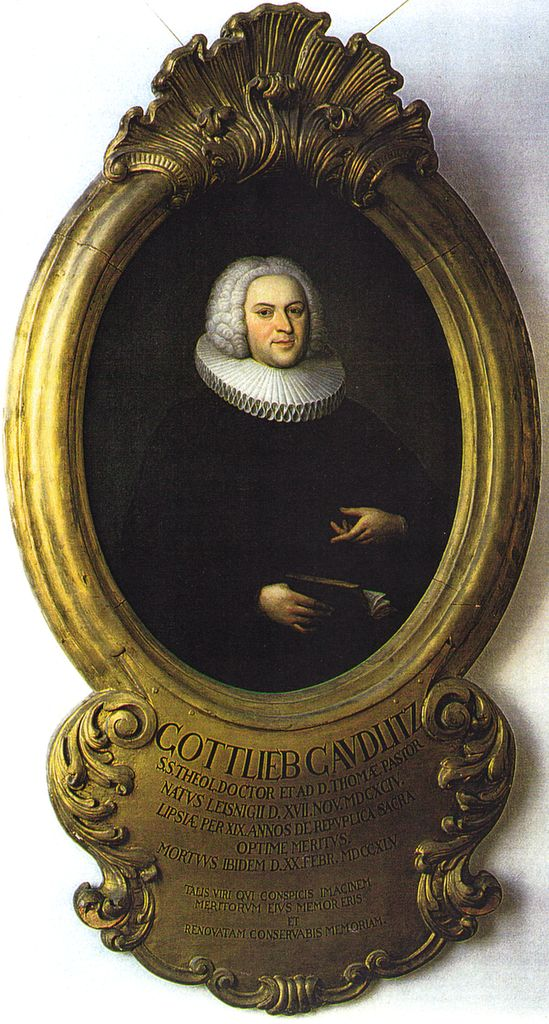 Gemälde von E.G. Hausmann 1745 ca. 2m hoch, 1976 restauriert in Thomaskirche Leipzig